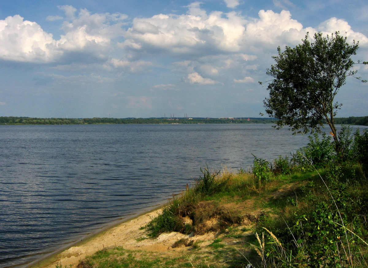 Jezioro Dzierżno Duże w Rzeczycach.